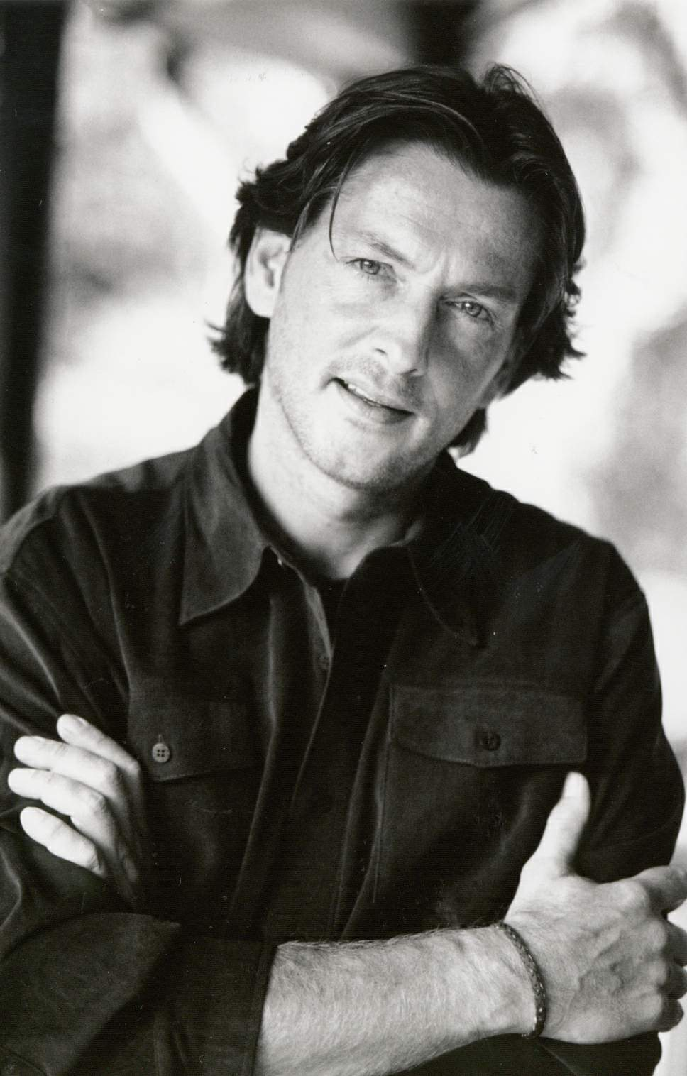 Erik de Zwart